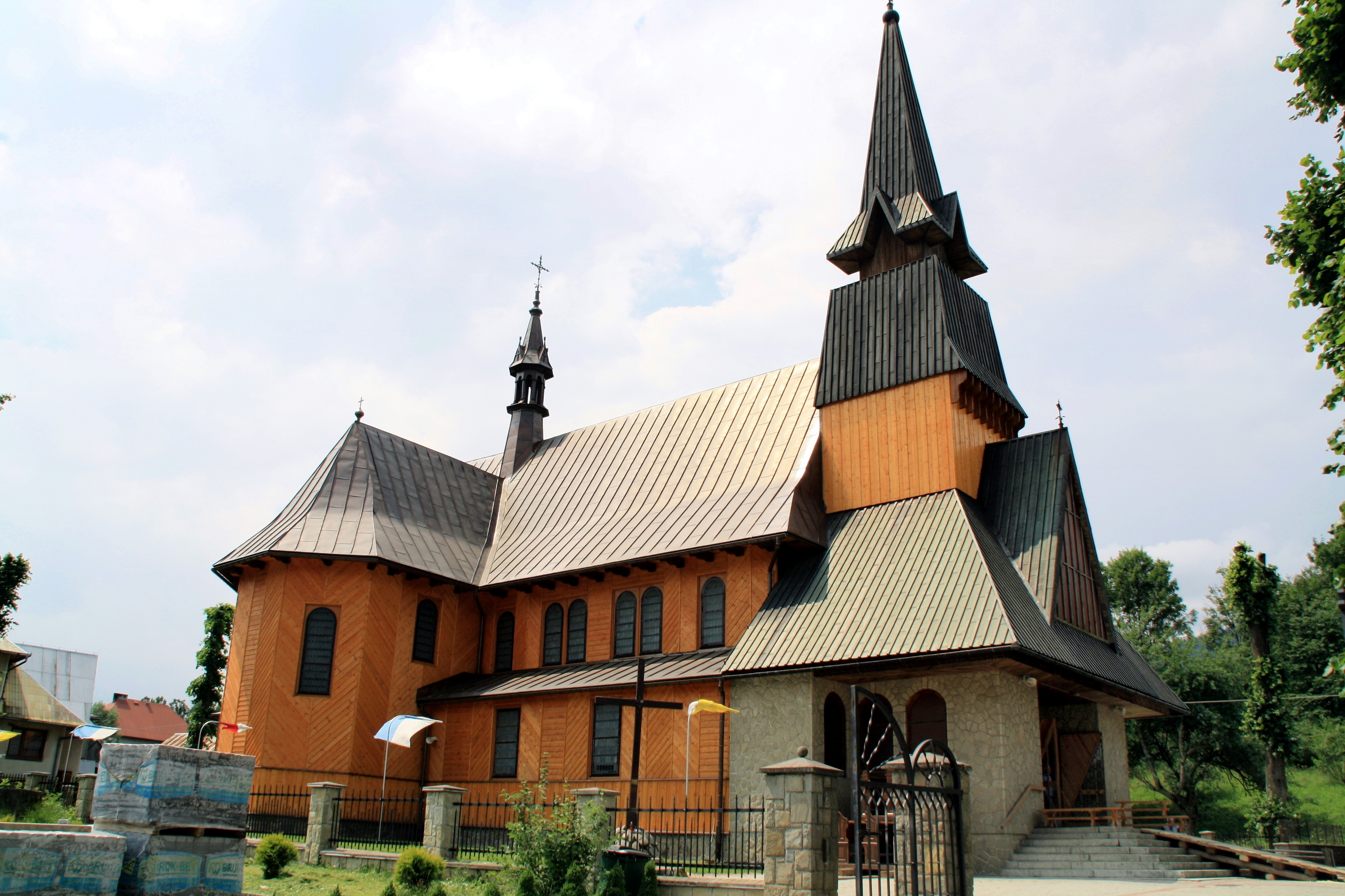 Kościół pw. Matki Bożej Nieustającej Pomocy w Jurkowie